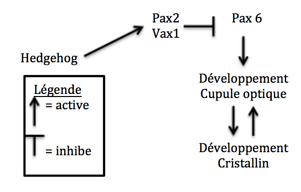 modifié de: Jeffrey (2009). Evolution and developpement in the cavefish Astyanax. Curr top dev bio, 86, p.191-221